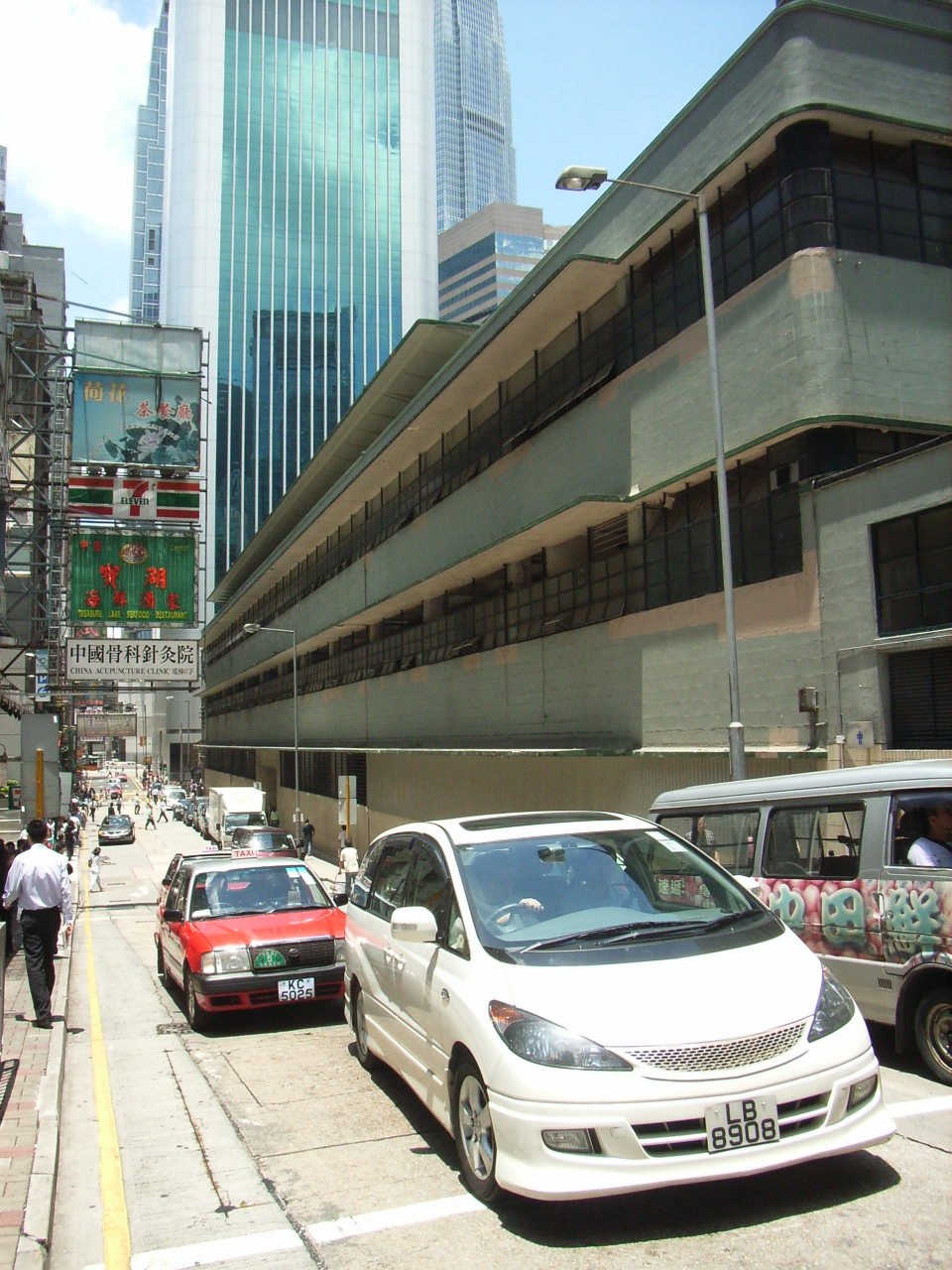 租庇利街是雙線南行車道，它的東邊有舊zh:中環街市，及中環的前恆生銀行總行大廈。